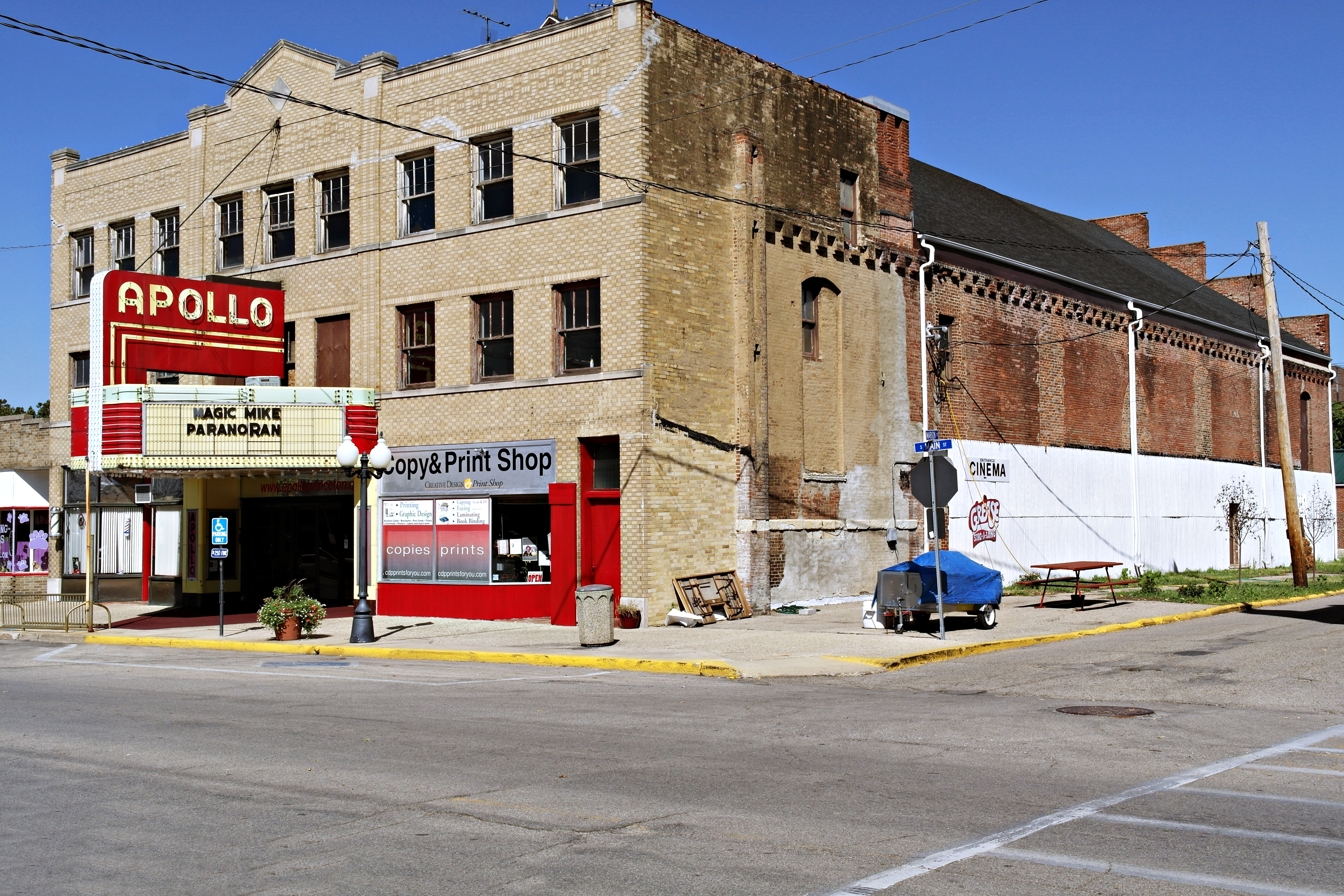 Apollo Movie Theatre, Princeton, Illinois